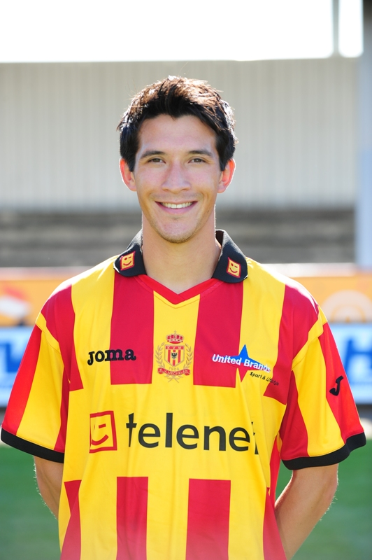 Xavier Chen